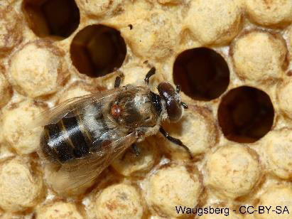 Varroa destructor phorétique sur le thorax d'une abeille mellifère Apis Mellifera mâle